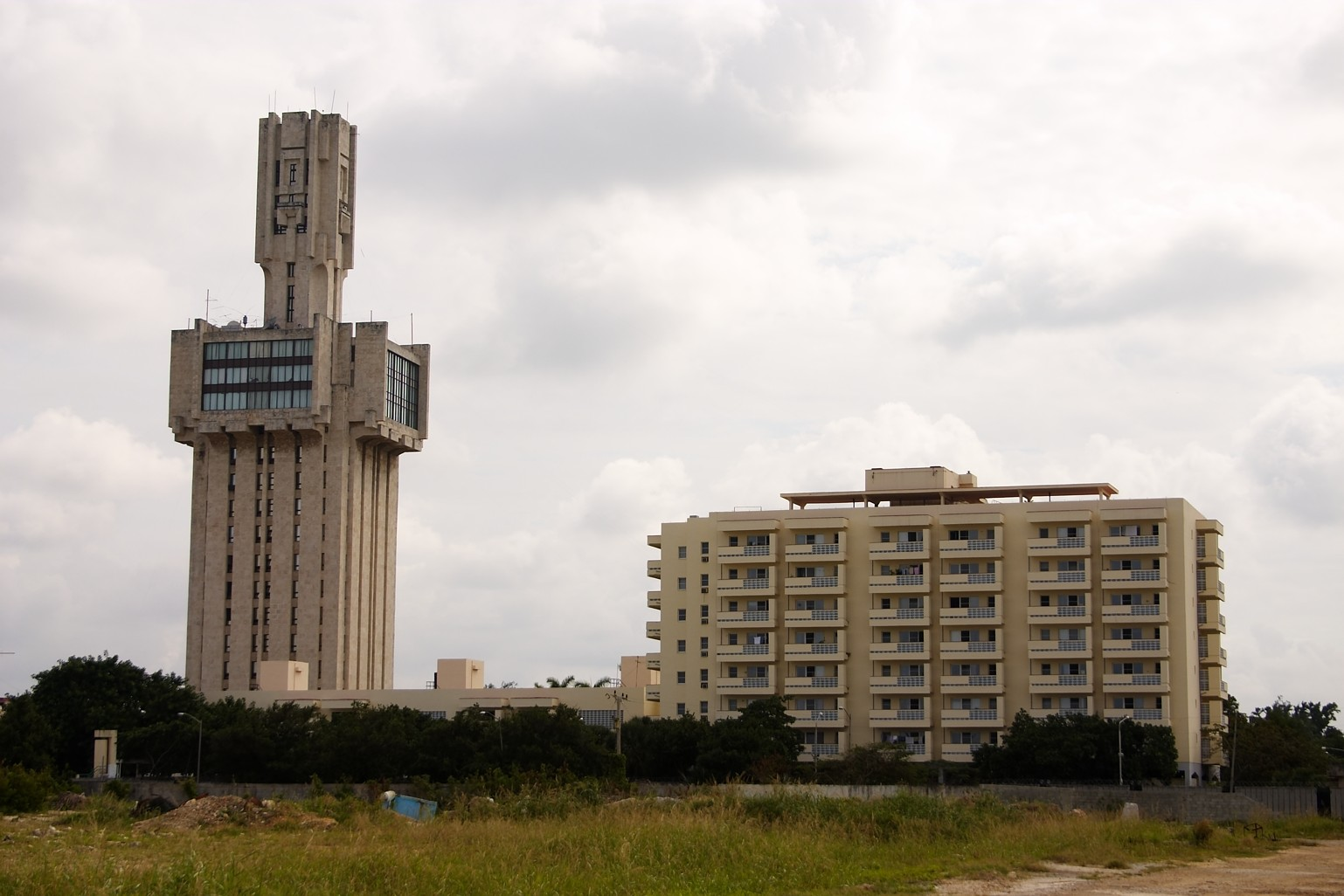 Russian embassy in Havana